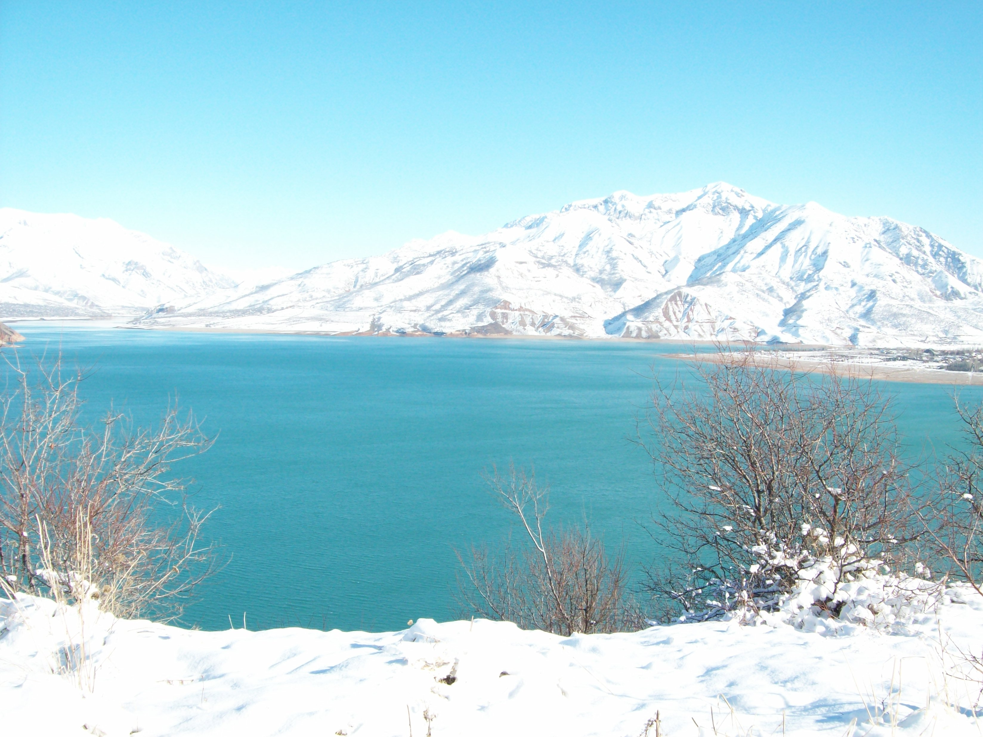 Зимний пейзаж Чарвакского водохранилища вместимостью 2 млрд. куб метров.